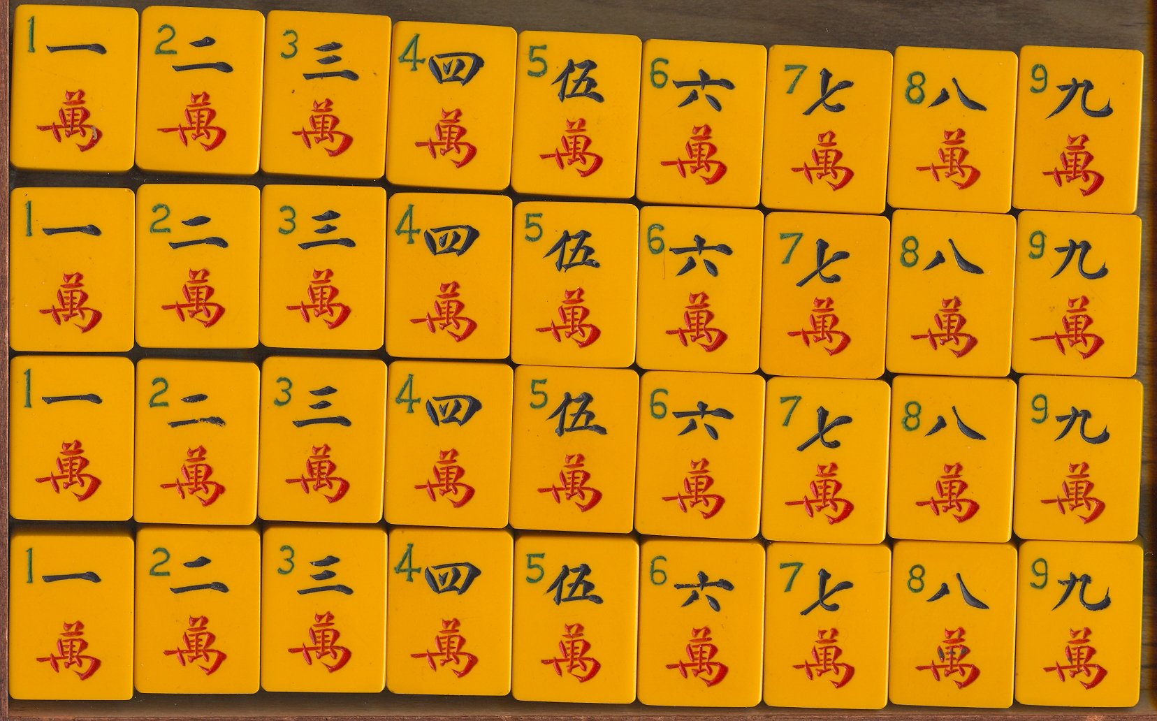 Foto van Mahjongstenen.